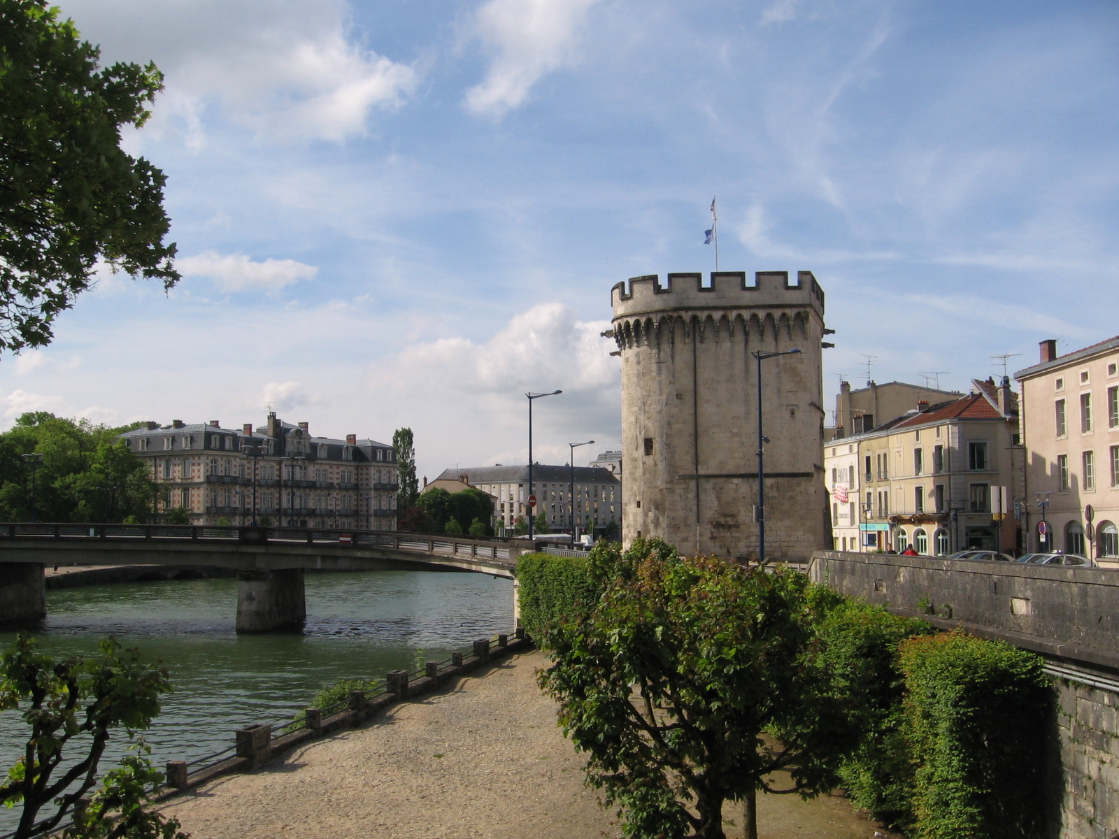 Verdun